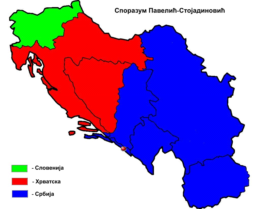 Karta Sporazuma Pavelić-Stojadinović sa prikazom granica jugoslovenskih republika.